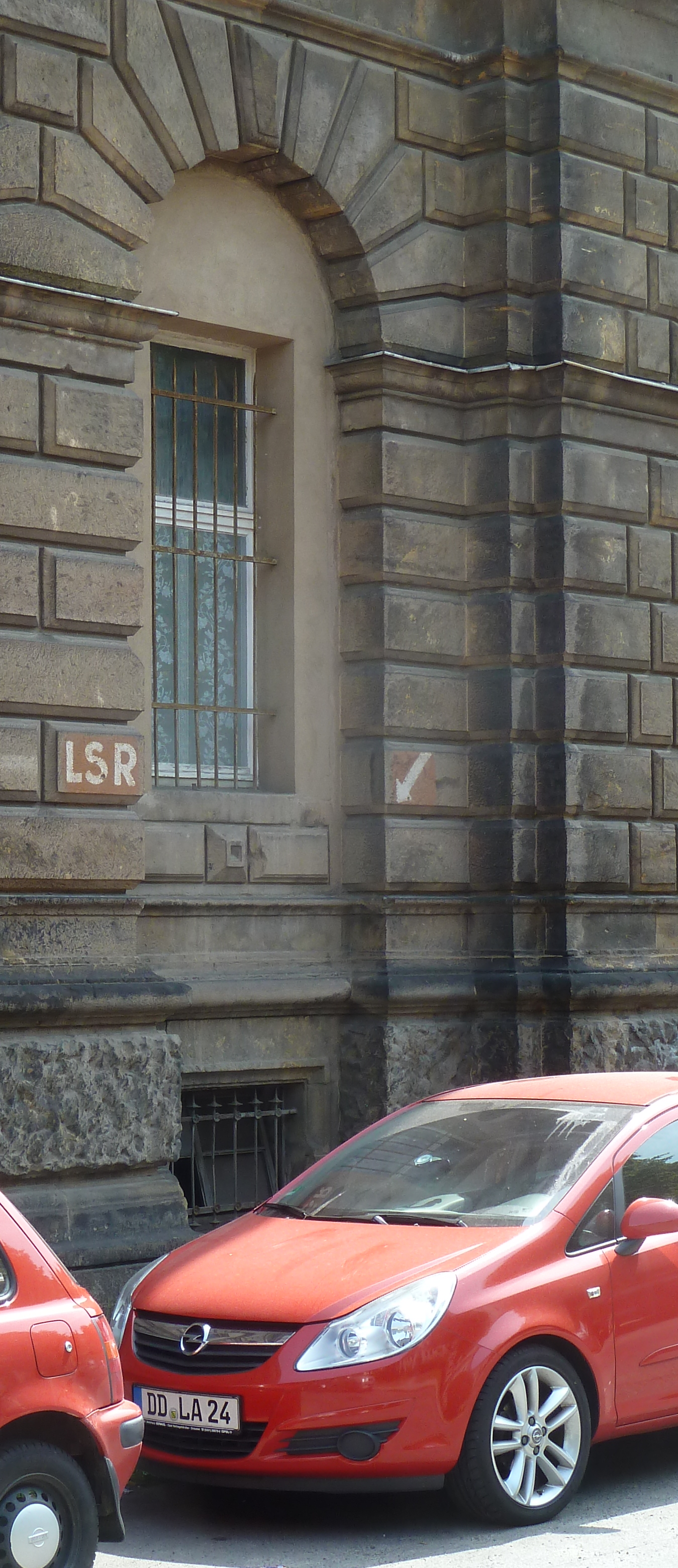 An der 1878 erbauten Oberpostdirektion Dresden gibt es noch Zeugen der einstigen Luftschutzräume (LSR) aus dem Zweiten Weltkrieg.